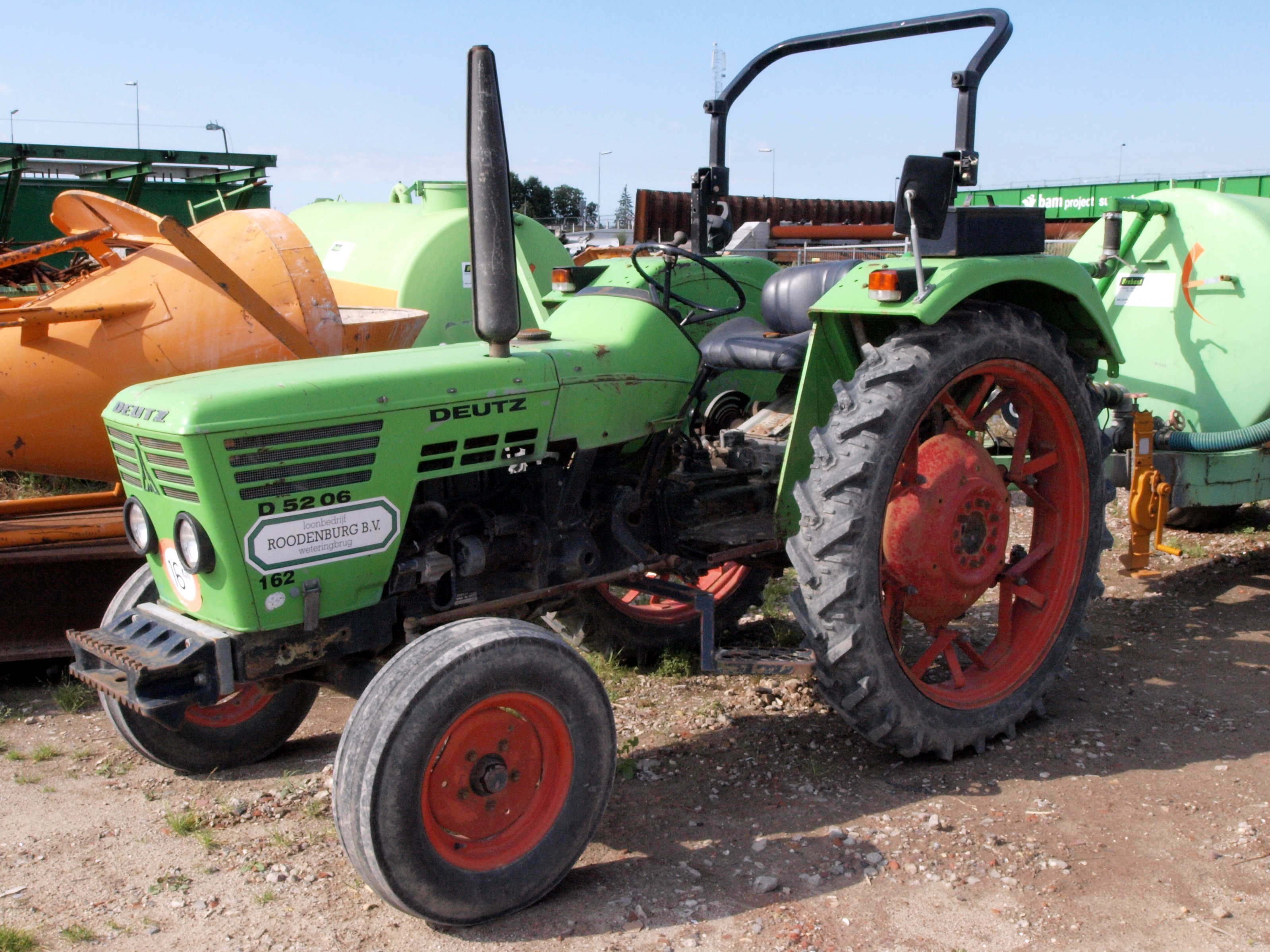 Deutz D 52